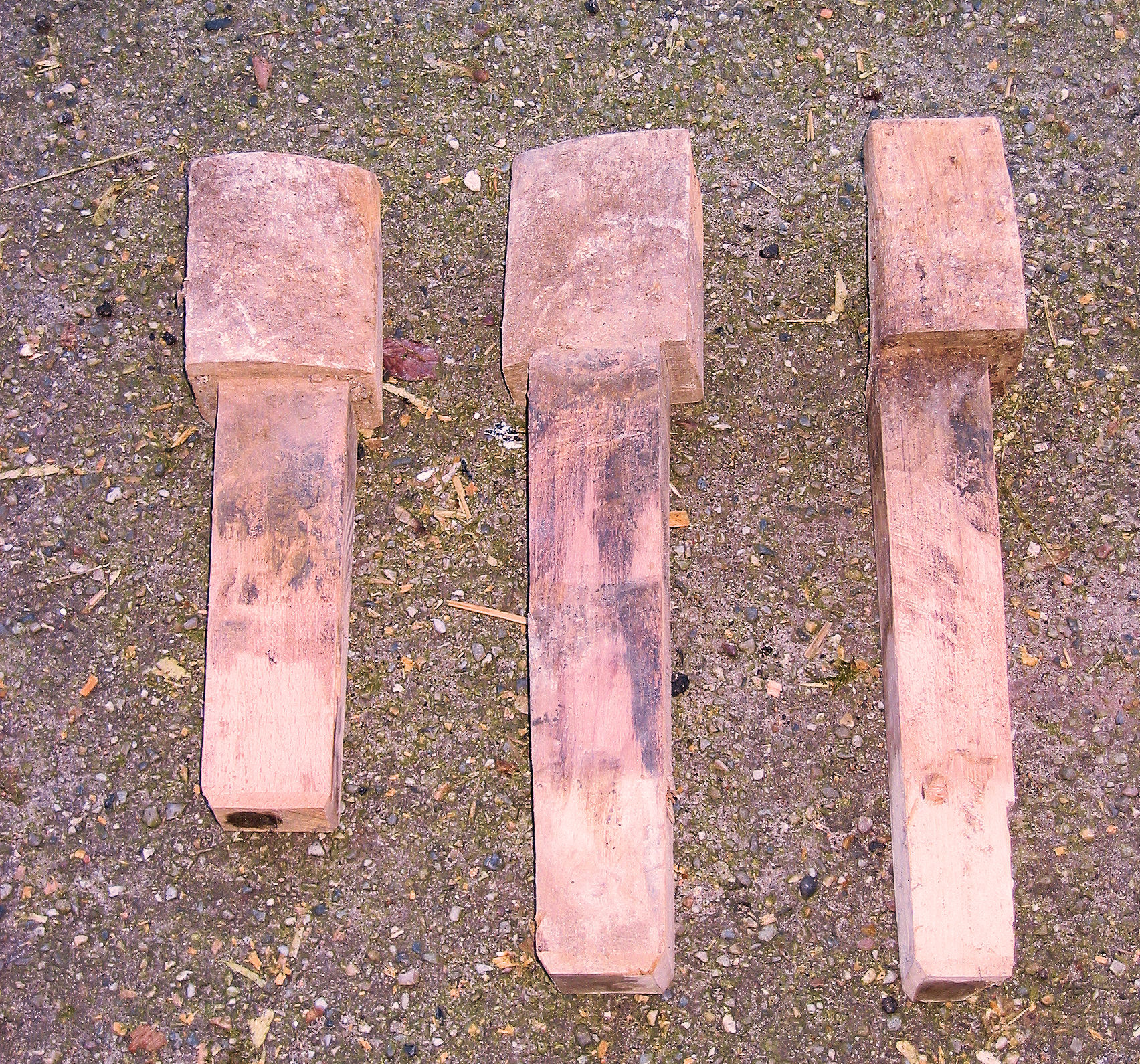 Kammen bonkelaar van de Concordia molen te Ede. De kam met de korte steel zit bij de kruisarm